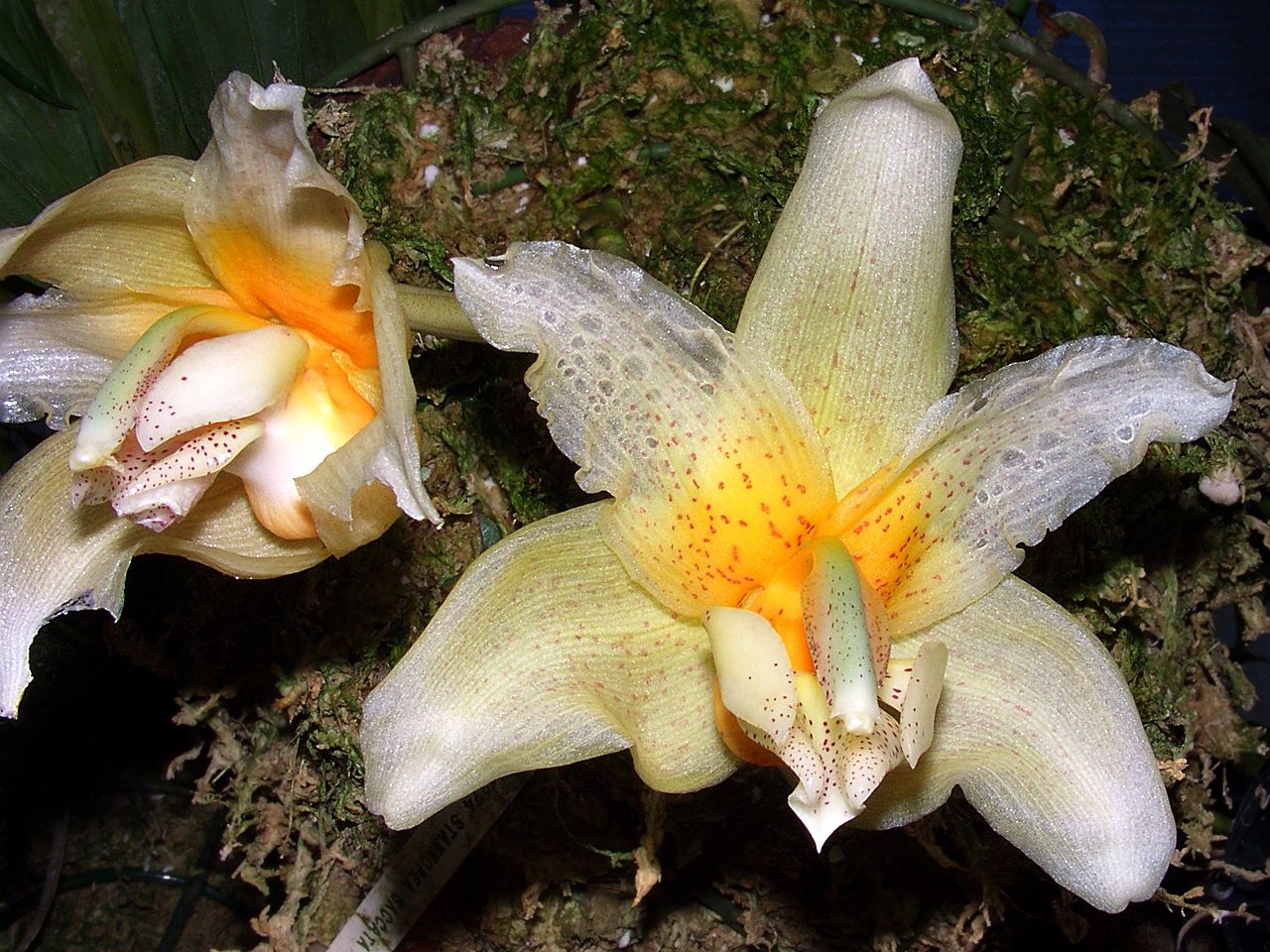 Stanhopea saccata